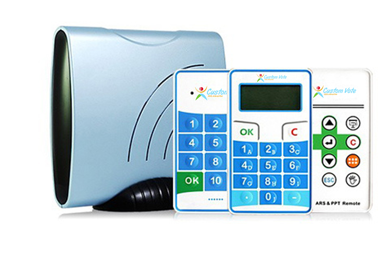 Sistema de votación interactiva de CustomVote, mandos de votación electrónicos y mando para el control del PowerPoint. El mejor método para obtener respuesta de los asistentes en cualquier evento o congreso.